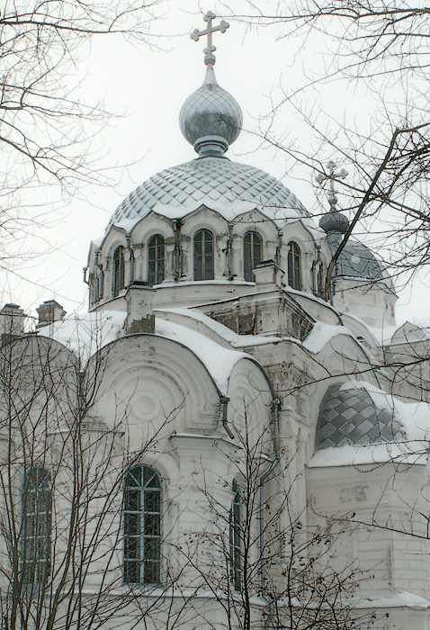 Вичуга: Свято-Воскресенская (белая) церковь (1904).